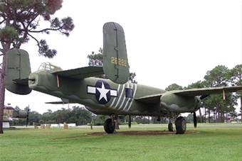 B-25J-10NC 43-28222